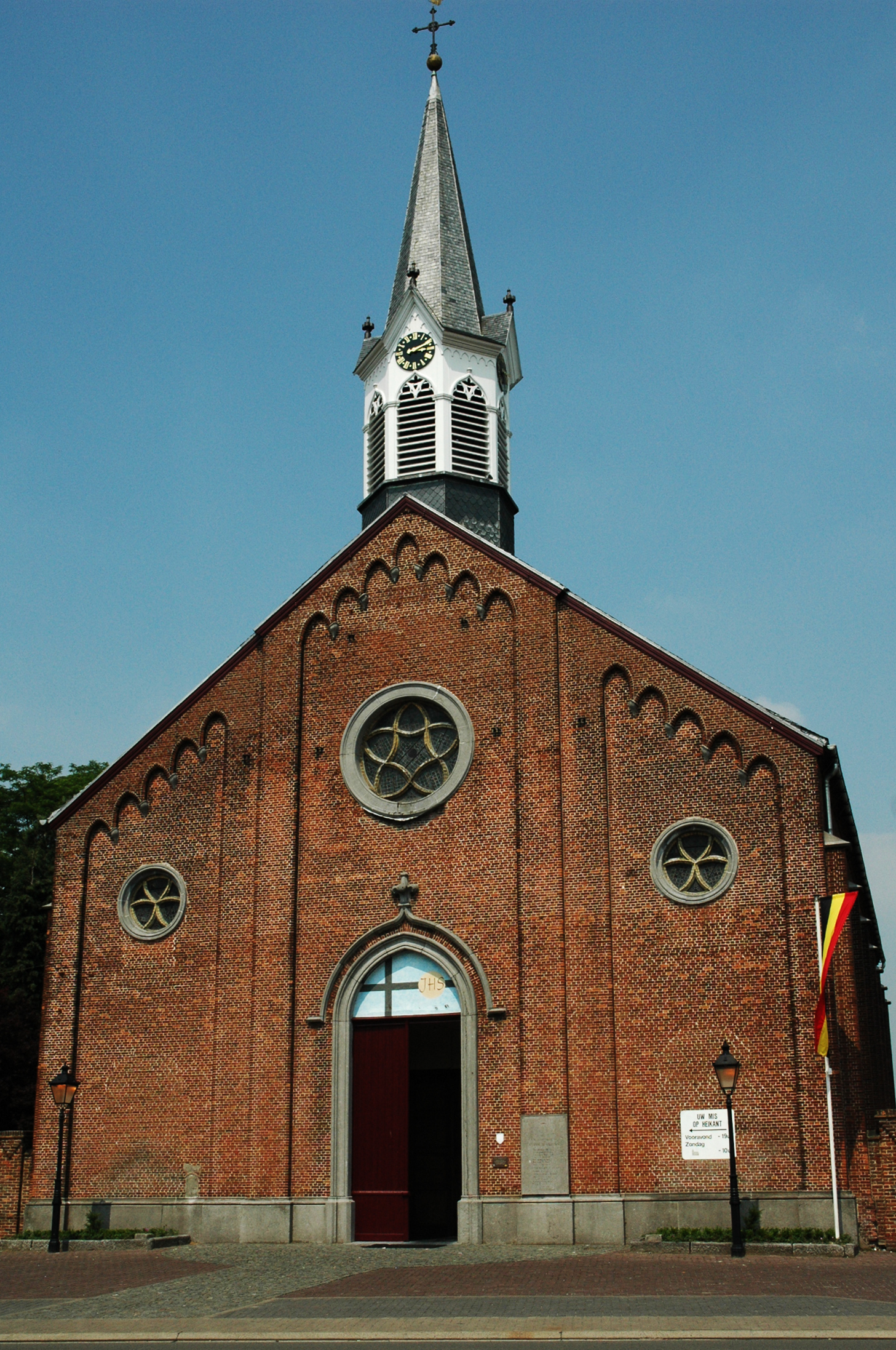 Parochiekerk Sint-Jozef en Sint-Antonius van Padua (ID: 84184)